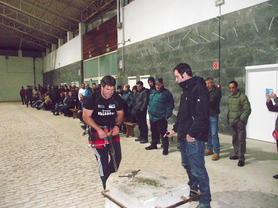 Santi Zubizarreta, 2015eko Bizkaiko eta Euskadiko Gizon Proba Txapelketan.